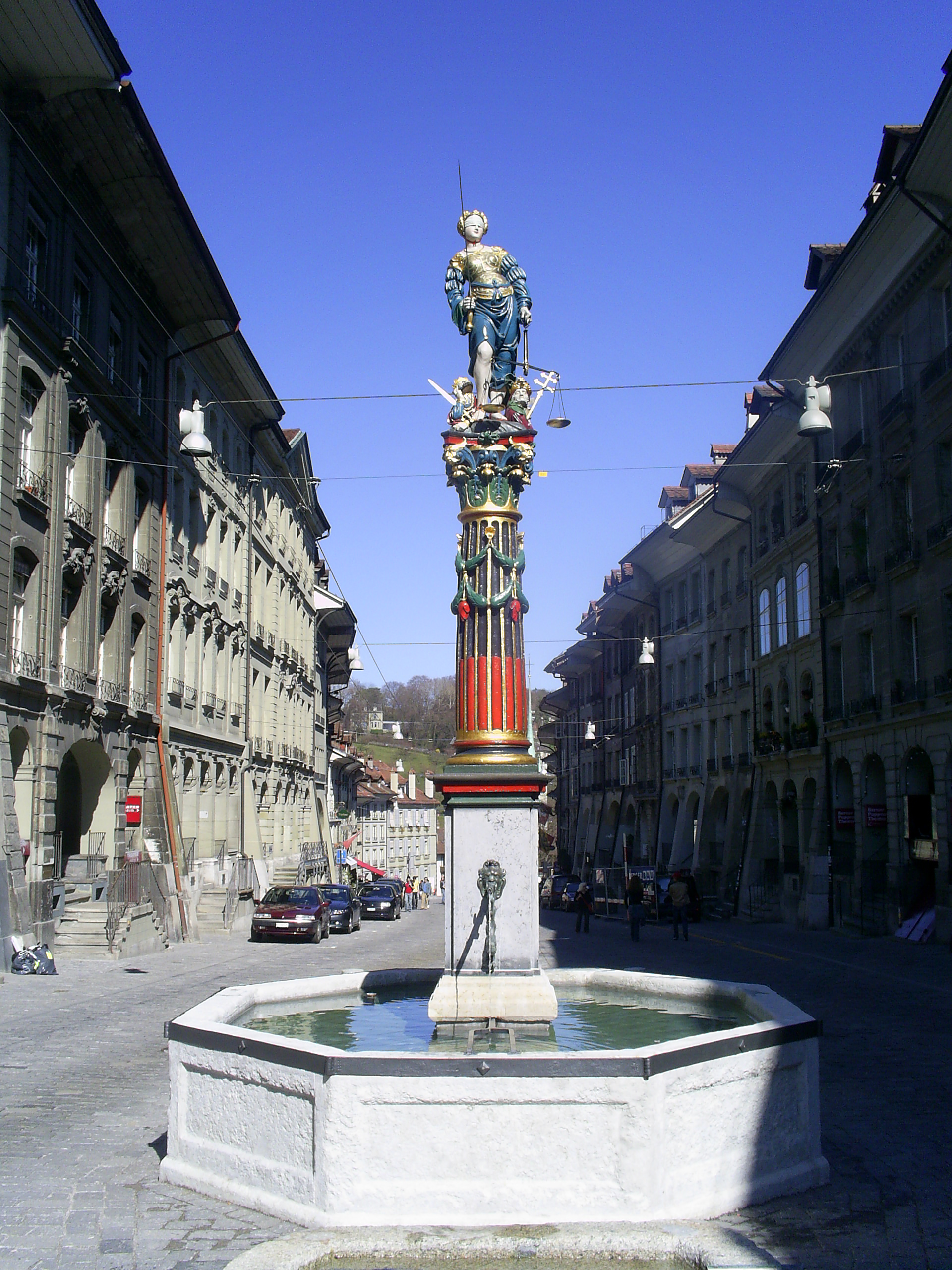 Fuente de la Justicia en Berna